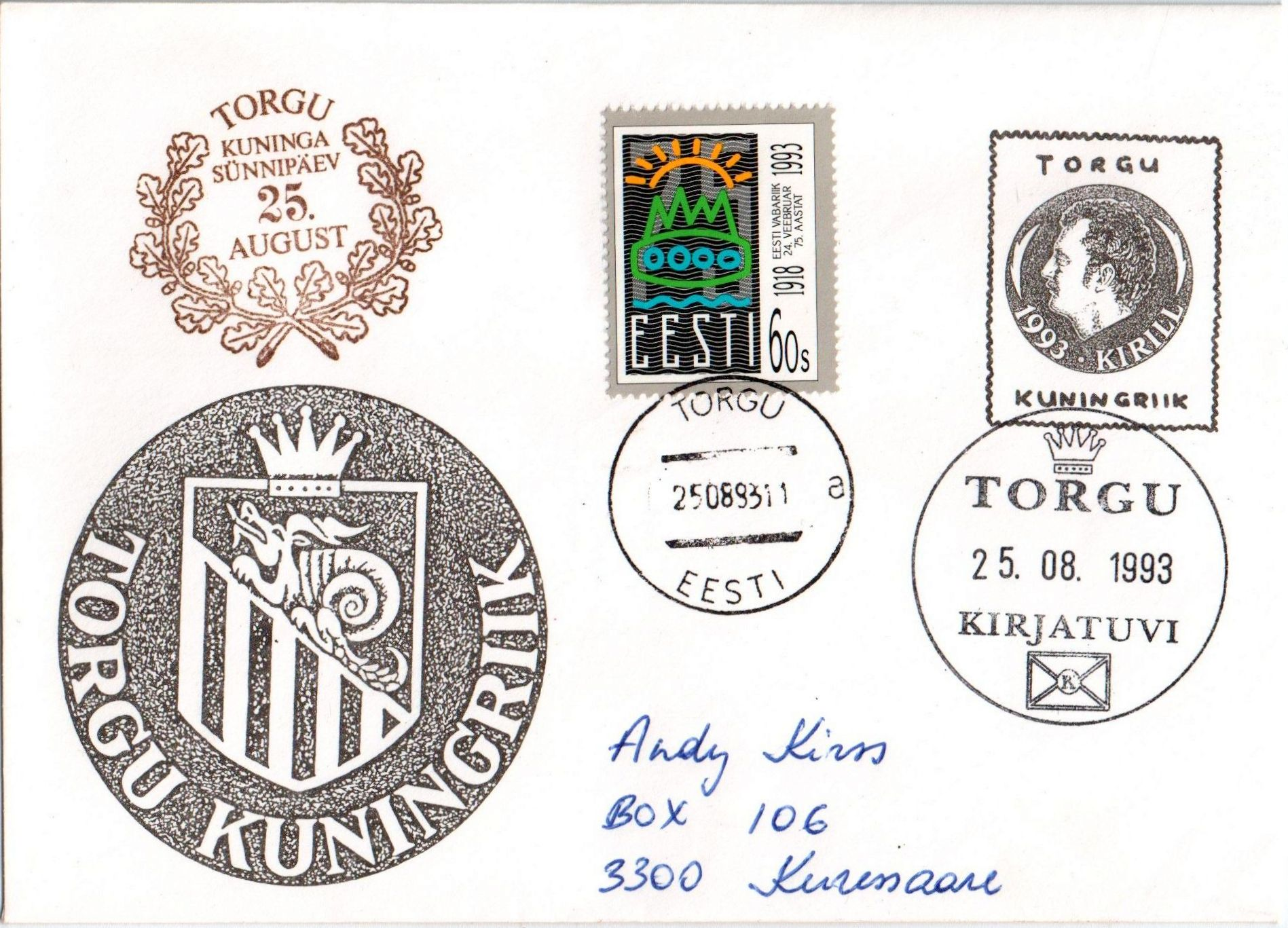 Kuningriigi postiteenistuse algus